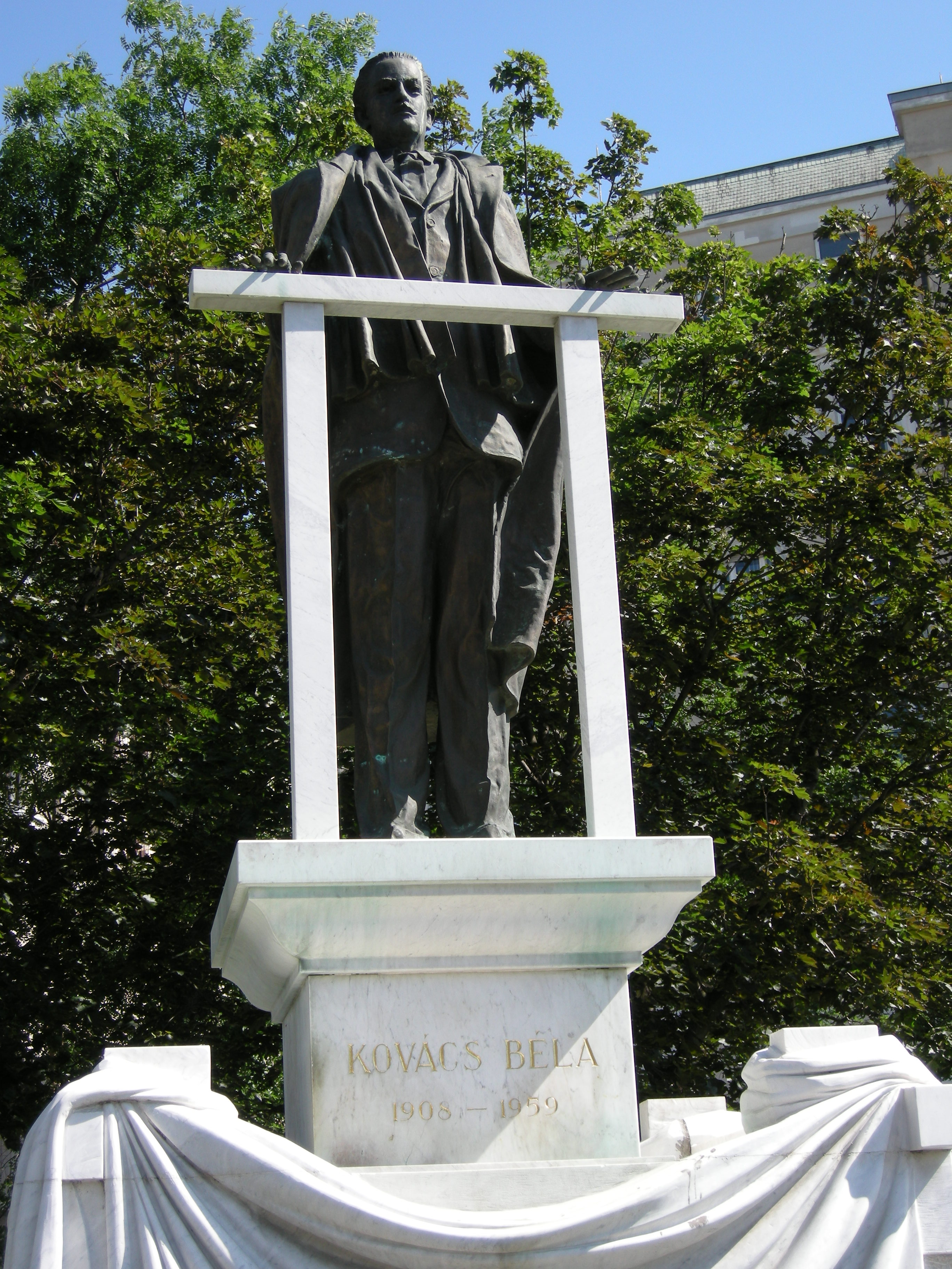 Statue de Kovacs Bela, à Budapest